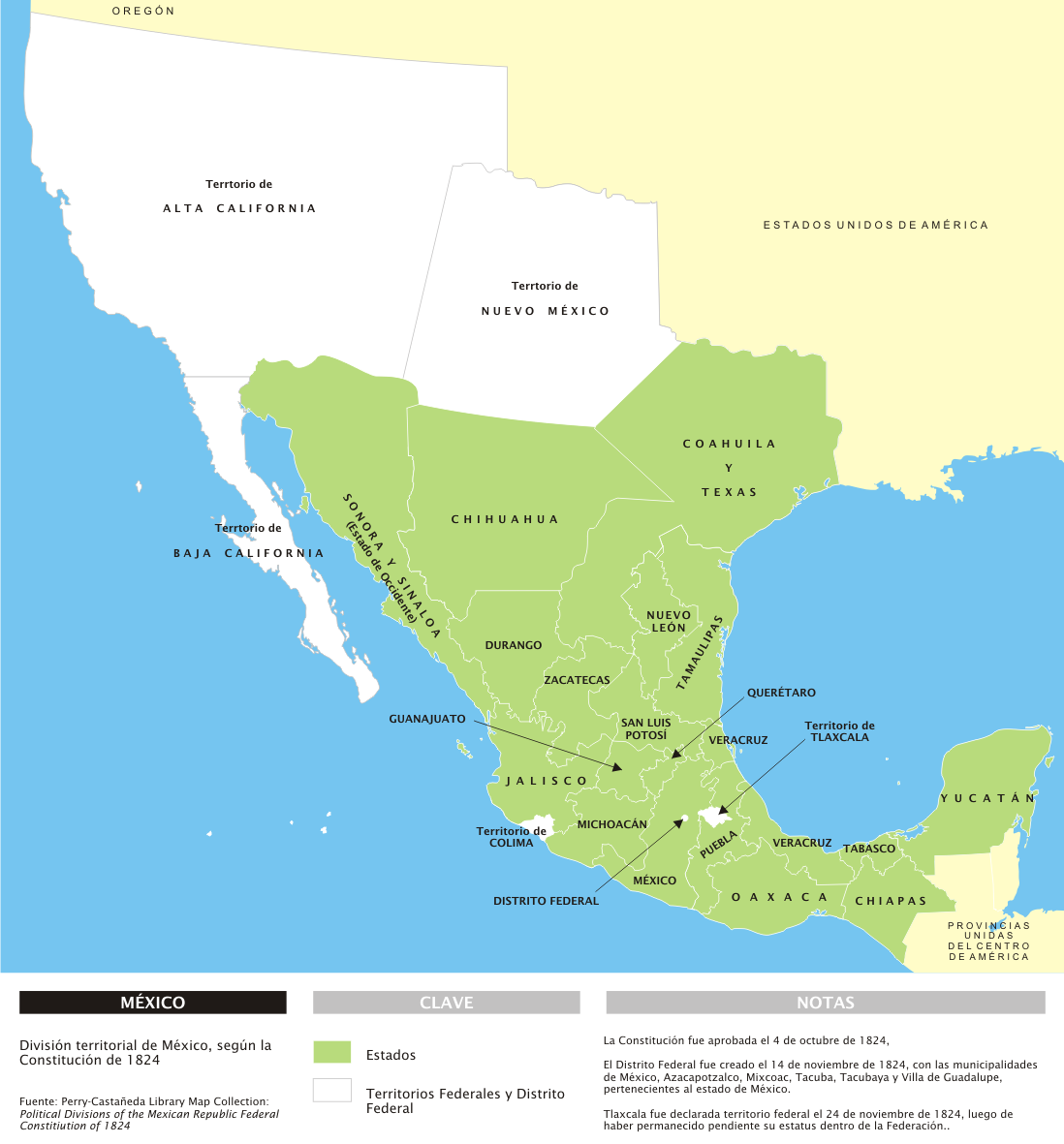 División territorial de México en 1824, con notas en español.